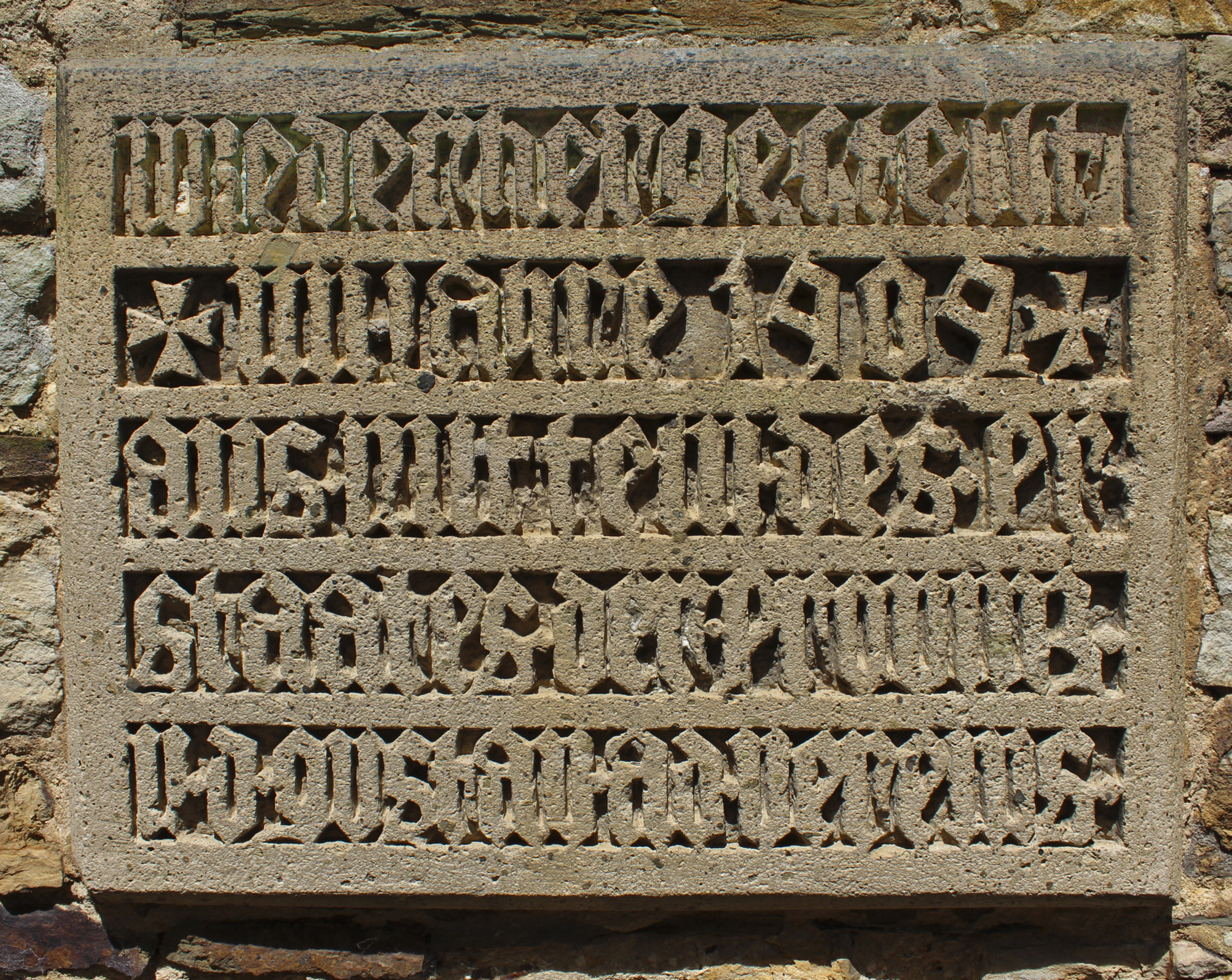 Inschrift an der Außenfassade der Pfarrkirche Kircheib